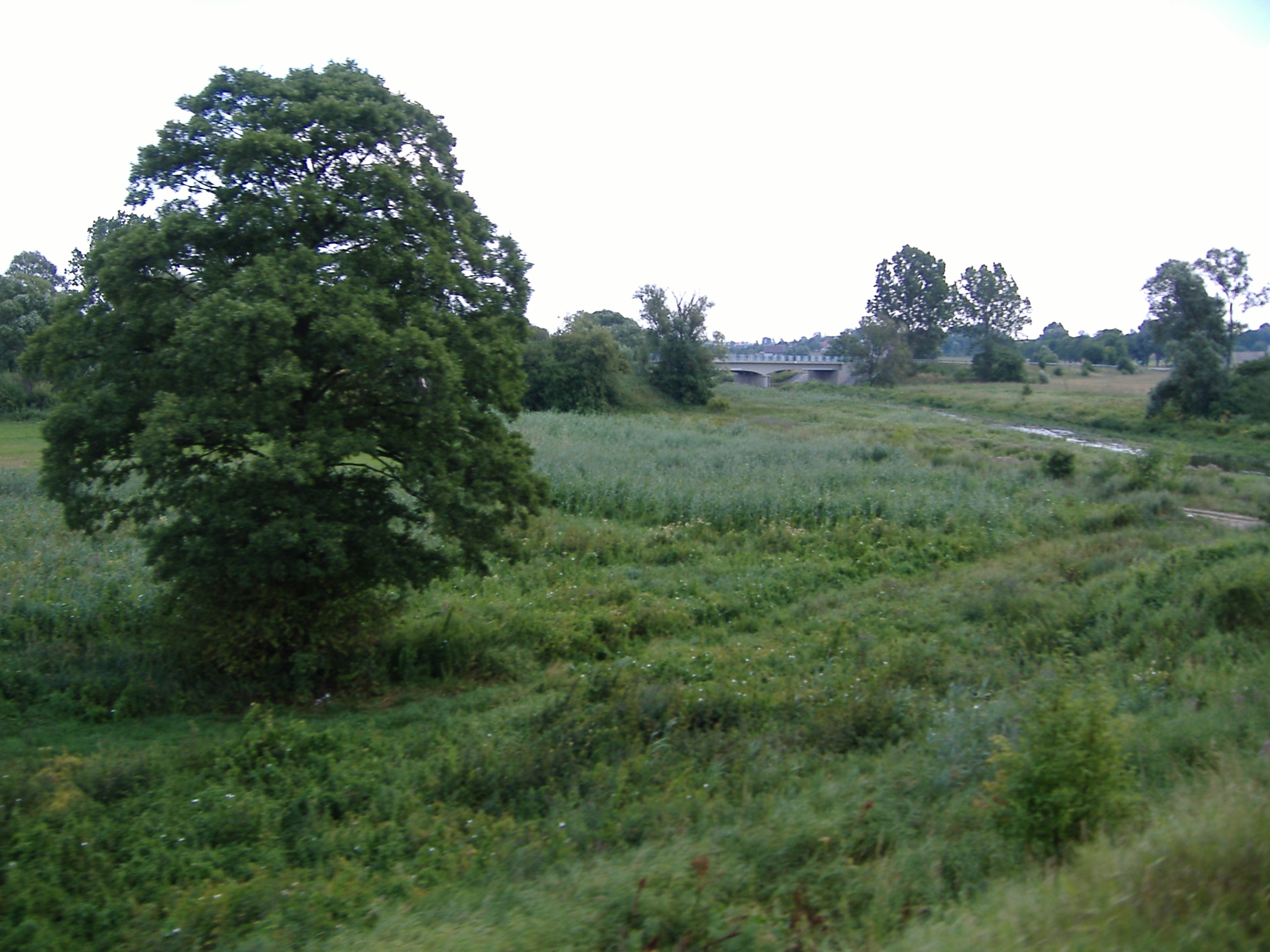 Supraśl (rzeka) - dolina